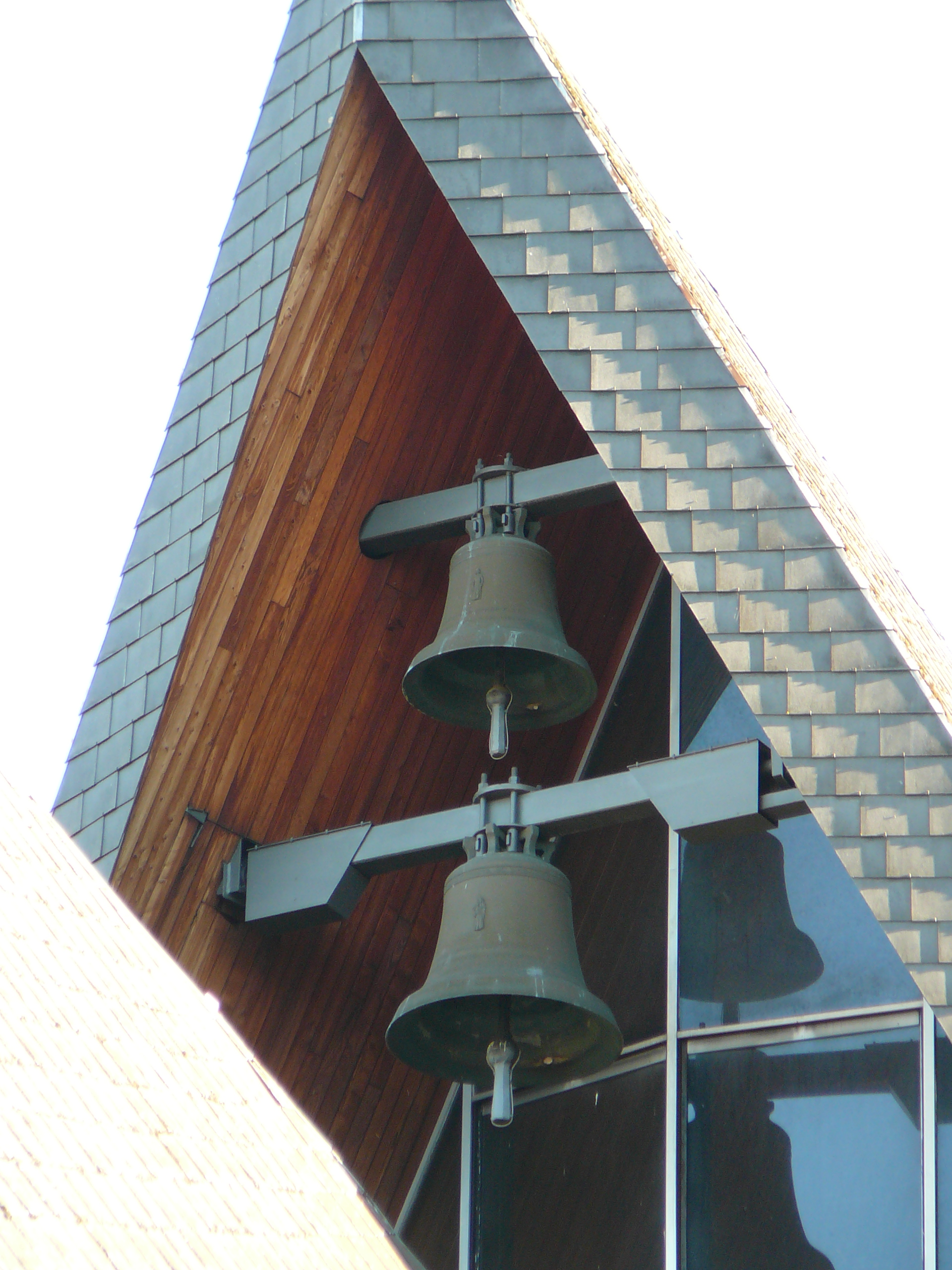 Römisch-katholische Pfarrkirche St. Paulus Dielsdorf, Glocken